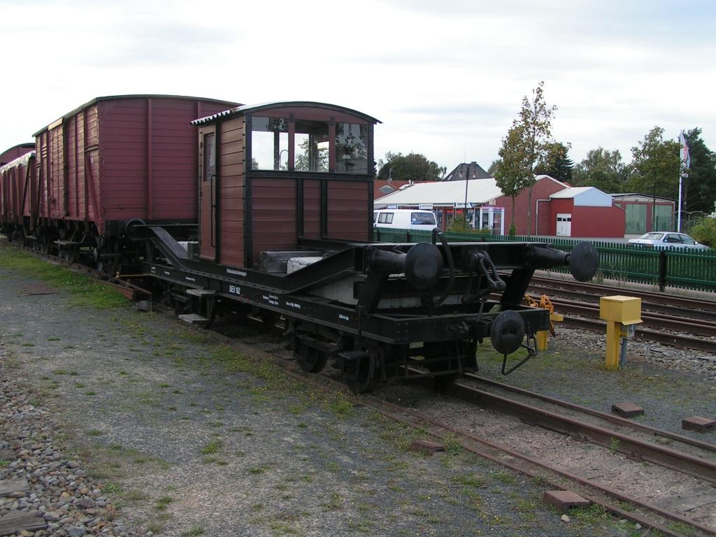 Pufferwagen